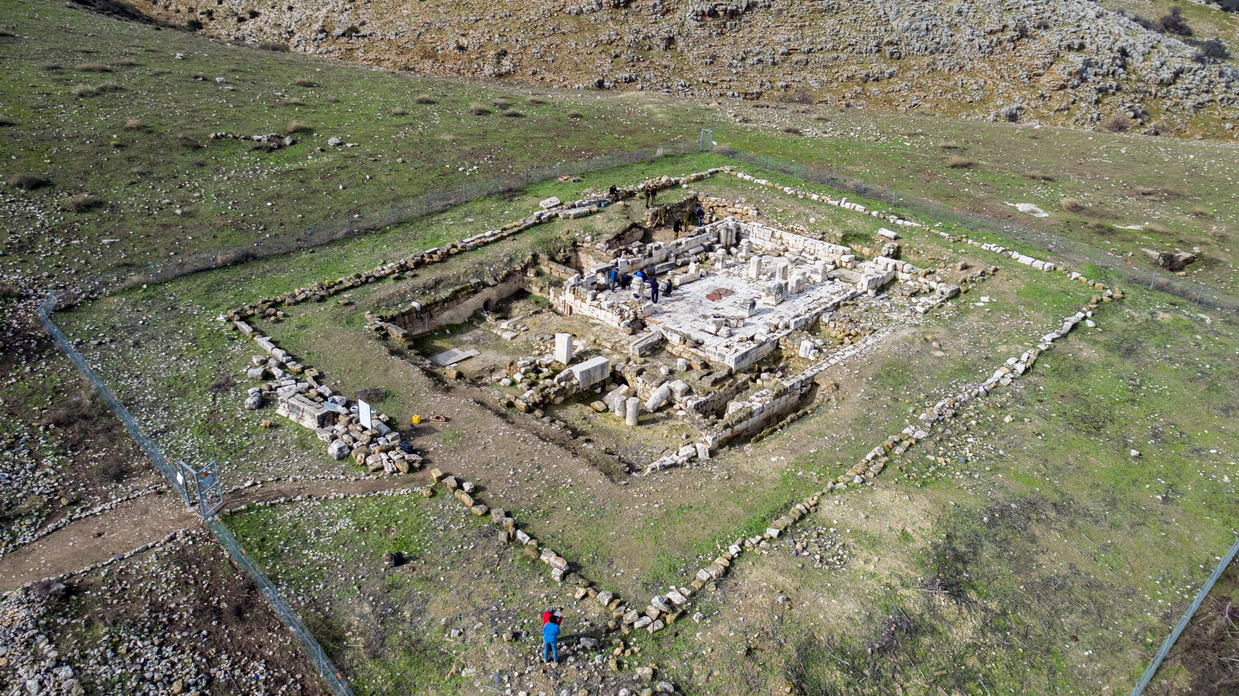 בית הכנסת העתיק במרות לאחר פעילות הנחלה לחיילי חטיבת גולני בשיתוף מינהל שימור מרחב צפון של רשות העתיקות